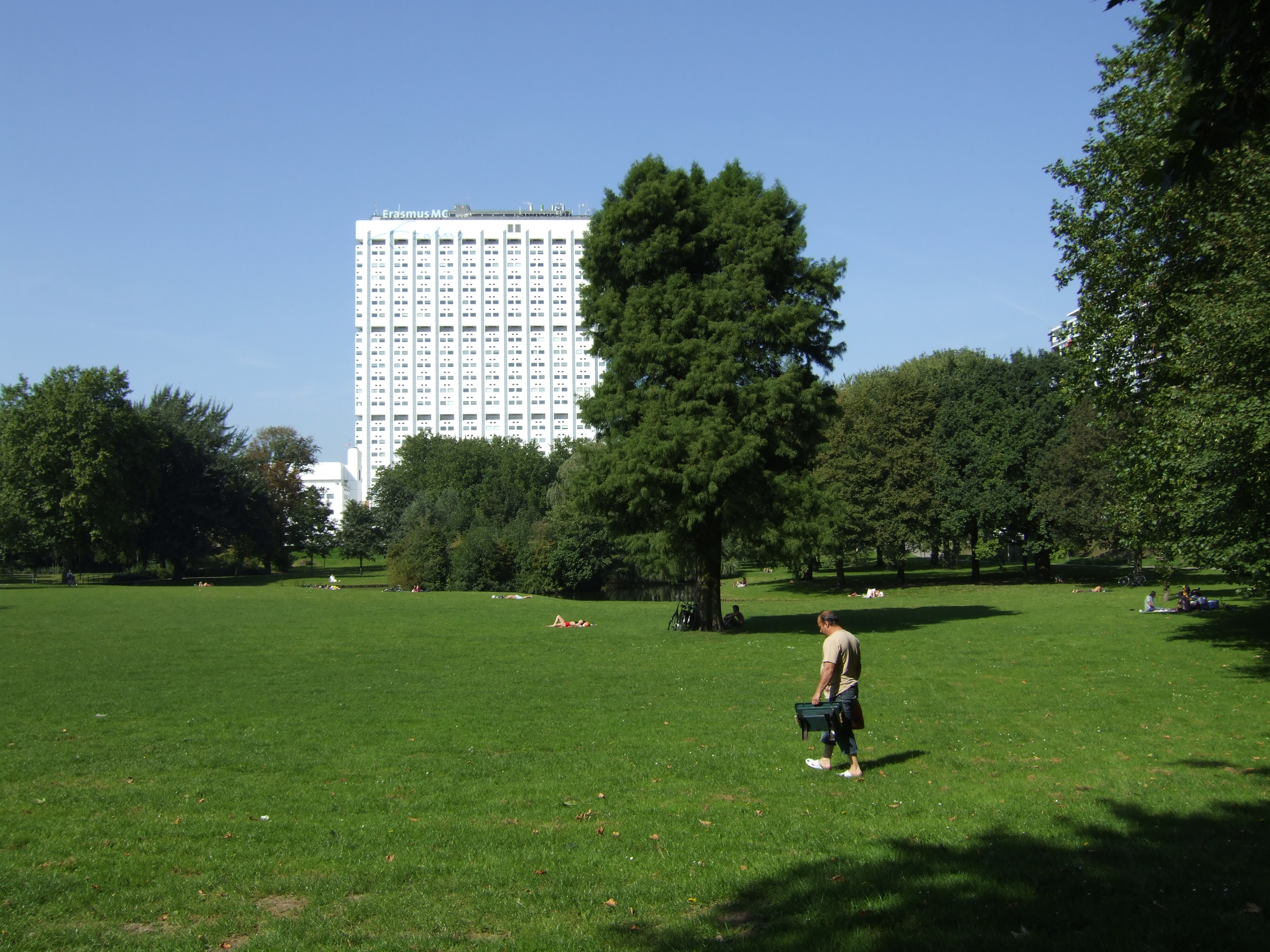 Park en Medische Faculteit Rotterdam, 10 september 2006